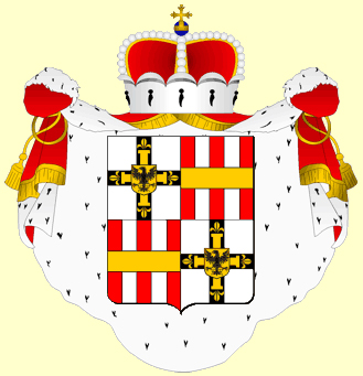 Герб Великого магистра Тевтонского ордена Иоганна Каспара фон Ампрингена (1619-1684)